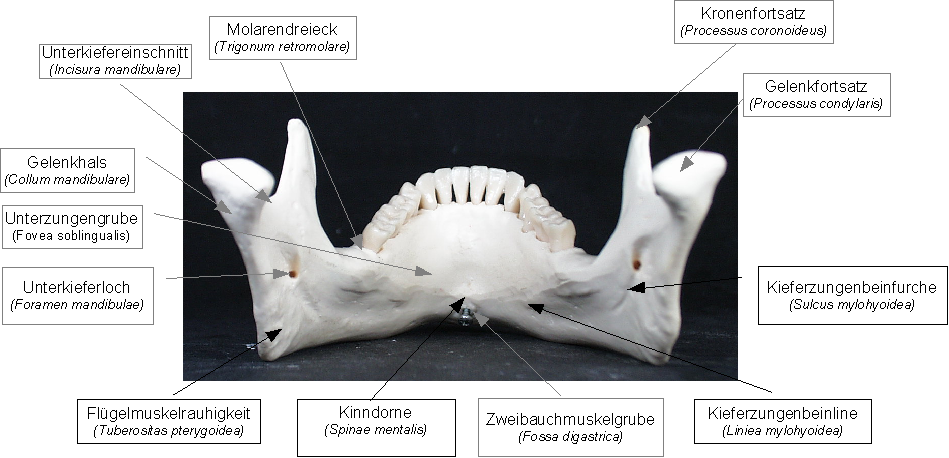 Abbildung des menschlichen Unterkiefers